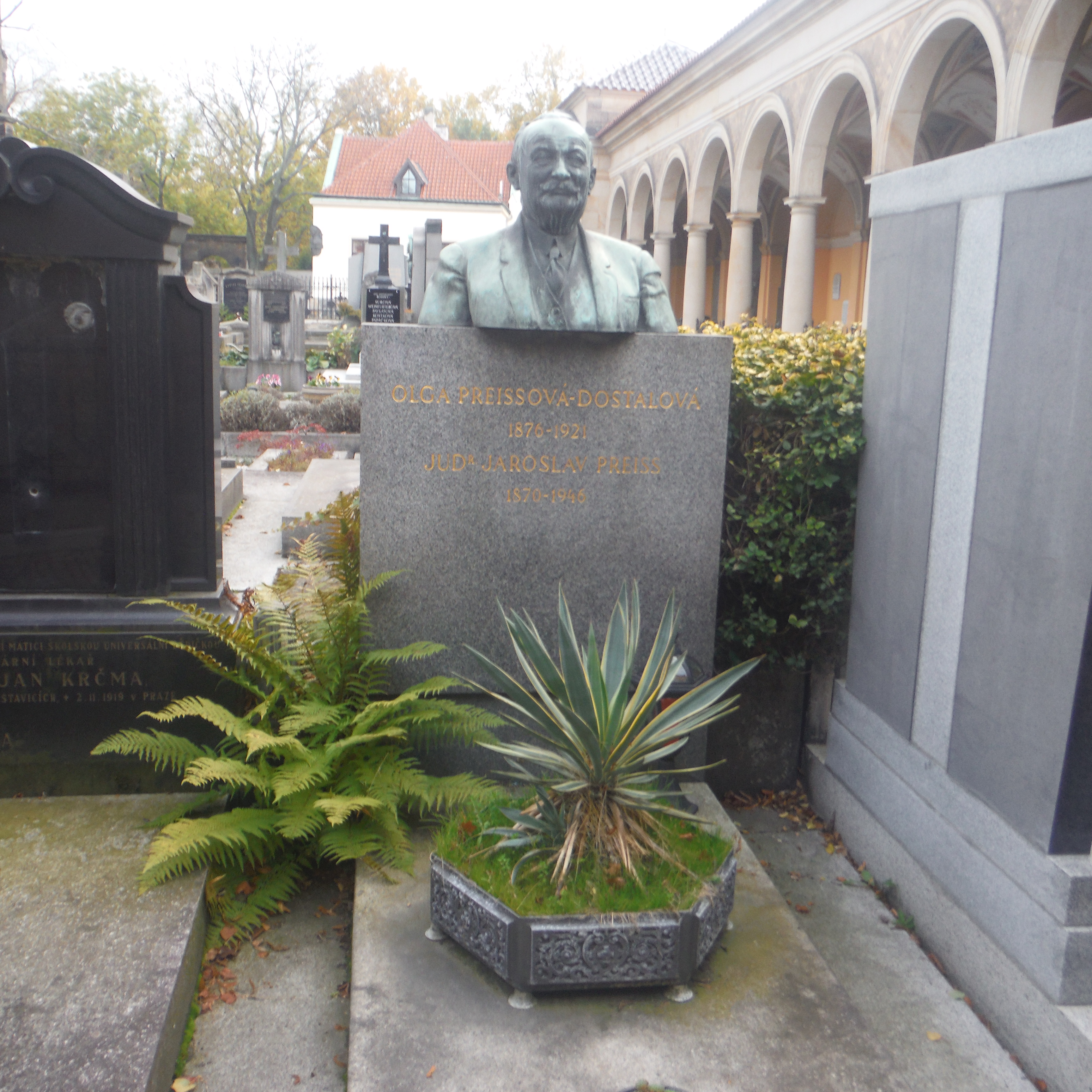 hrob